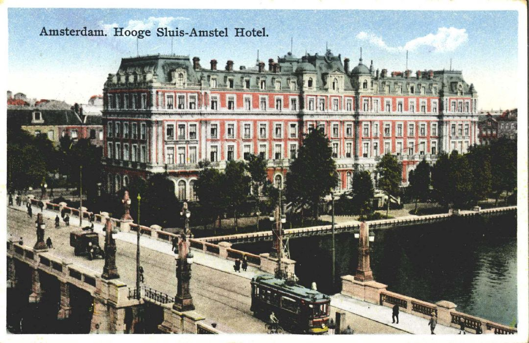 Hogesluis - Amstel Hotel - Photographed in Amsterdam between 1900 and 1914.